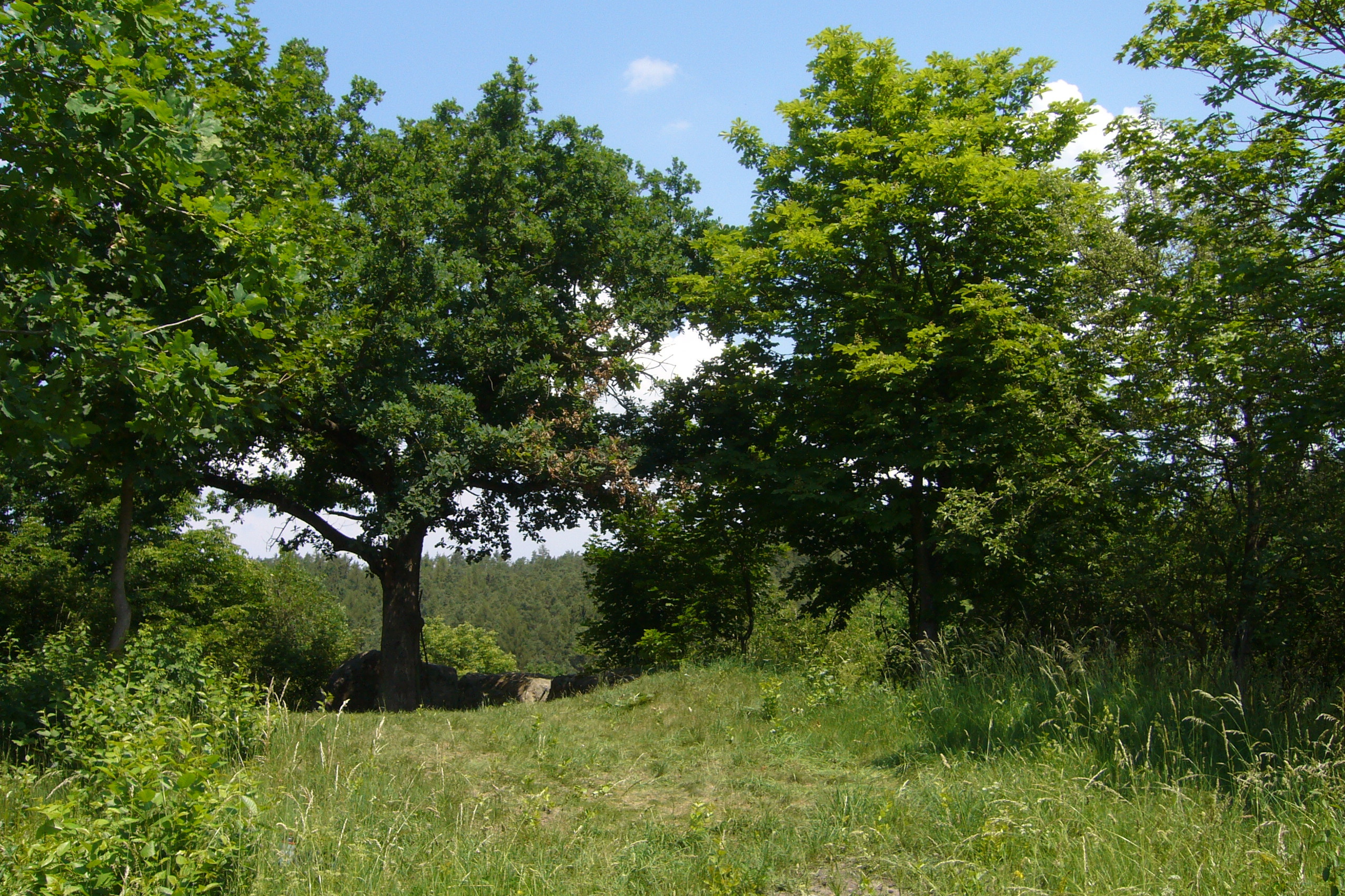 Hrad Komberk - hradní jádro, Čeminy.